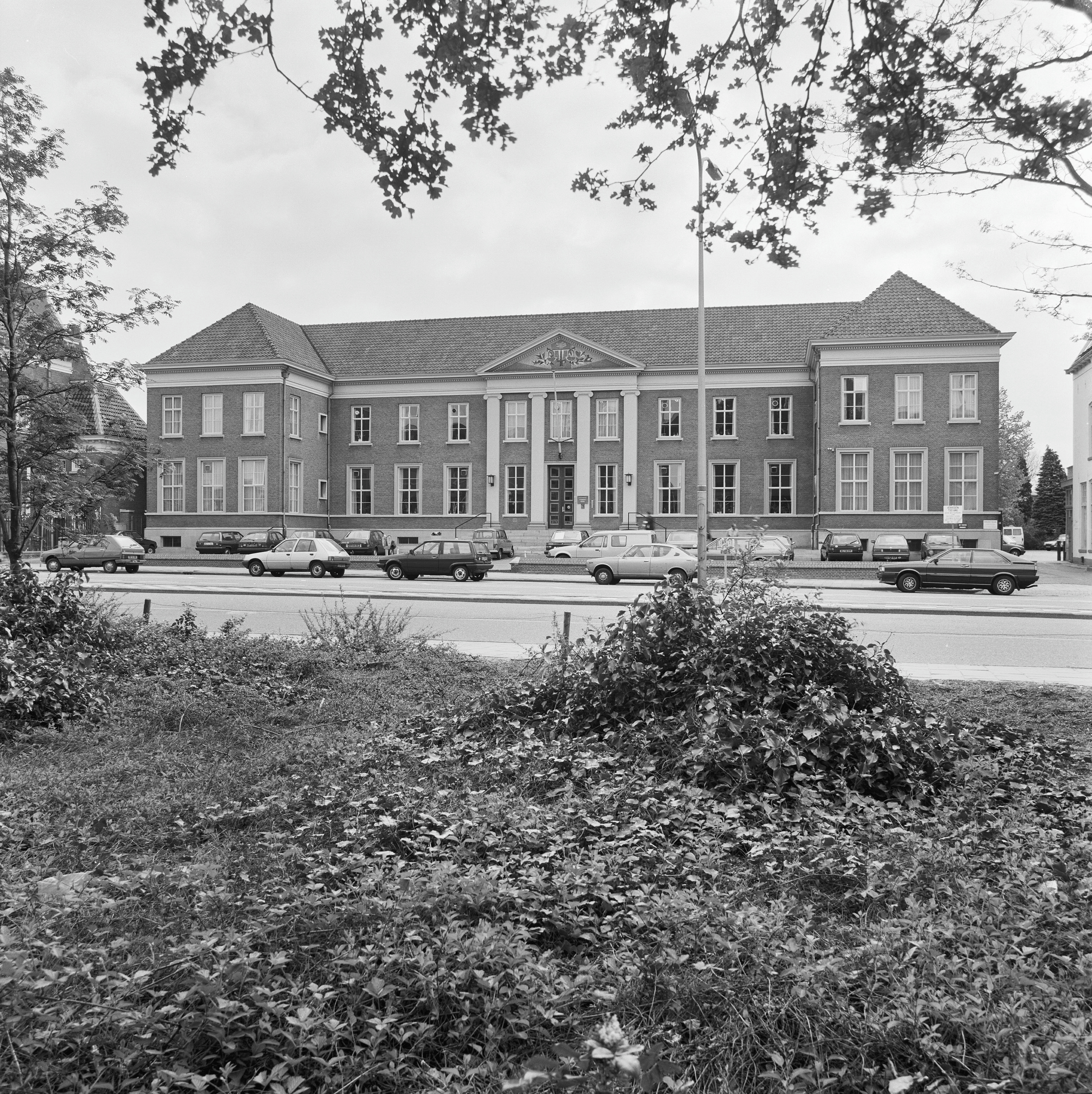 RECHTBANK: Exterieur OVERZICHT VOORGEVEL